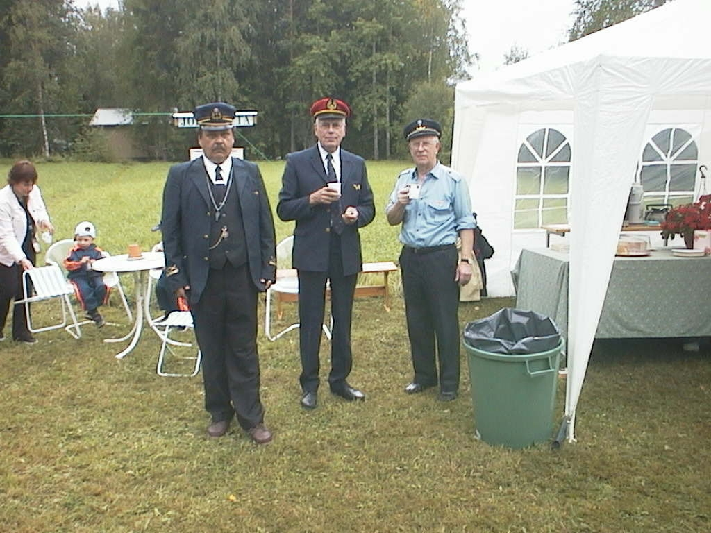 Lahnuksen rautatien viimeisen ajopäivän miehitys.